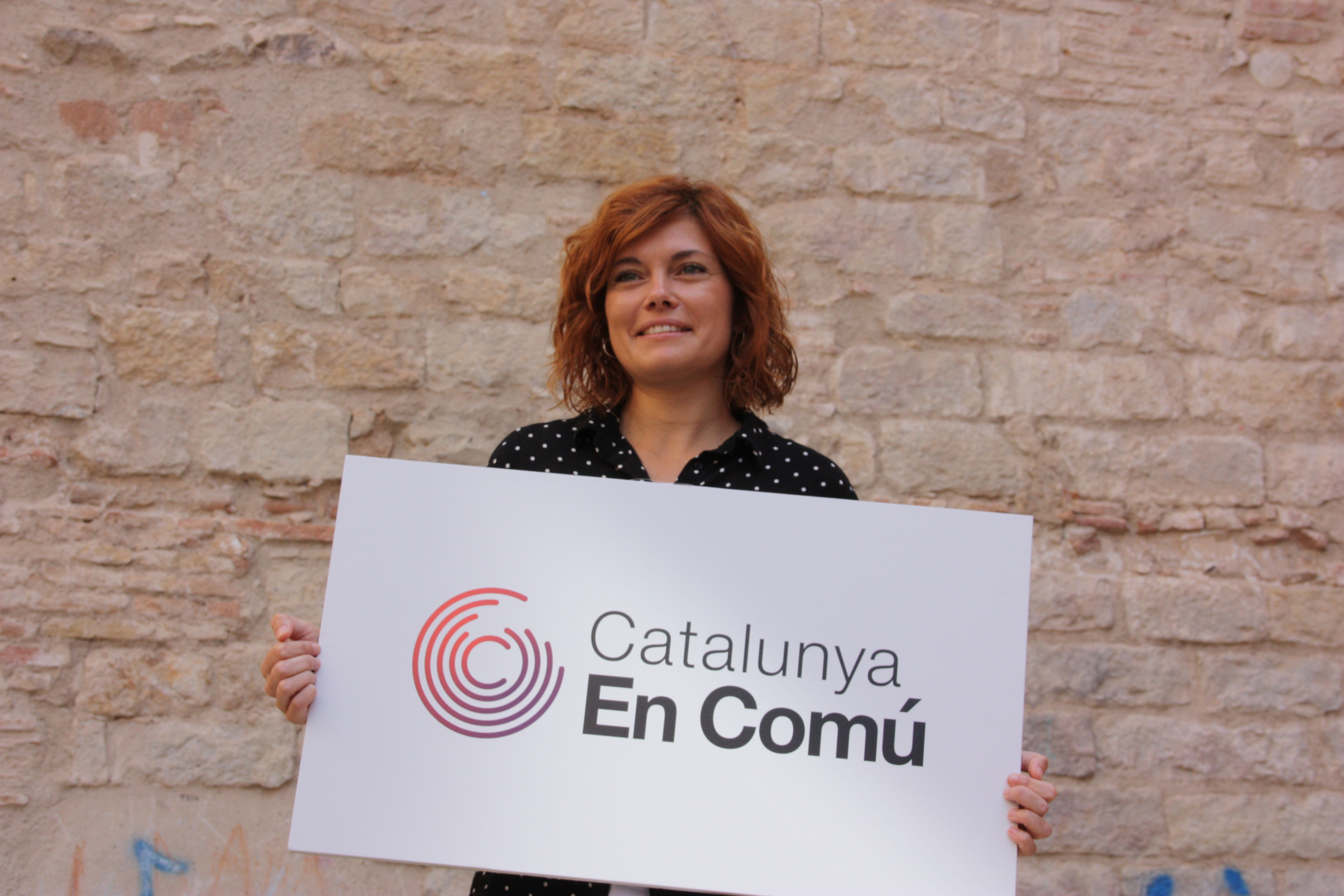 Elisenda Alamany presenta logo de Catalunya en Comú